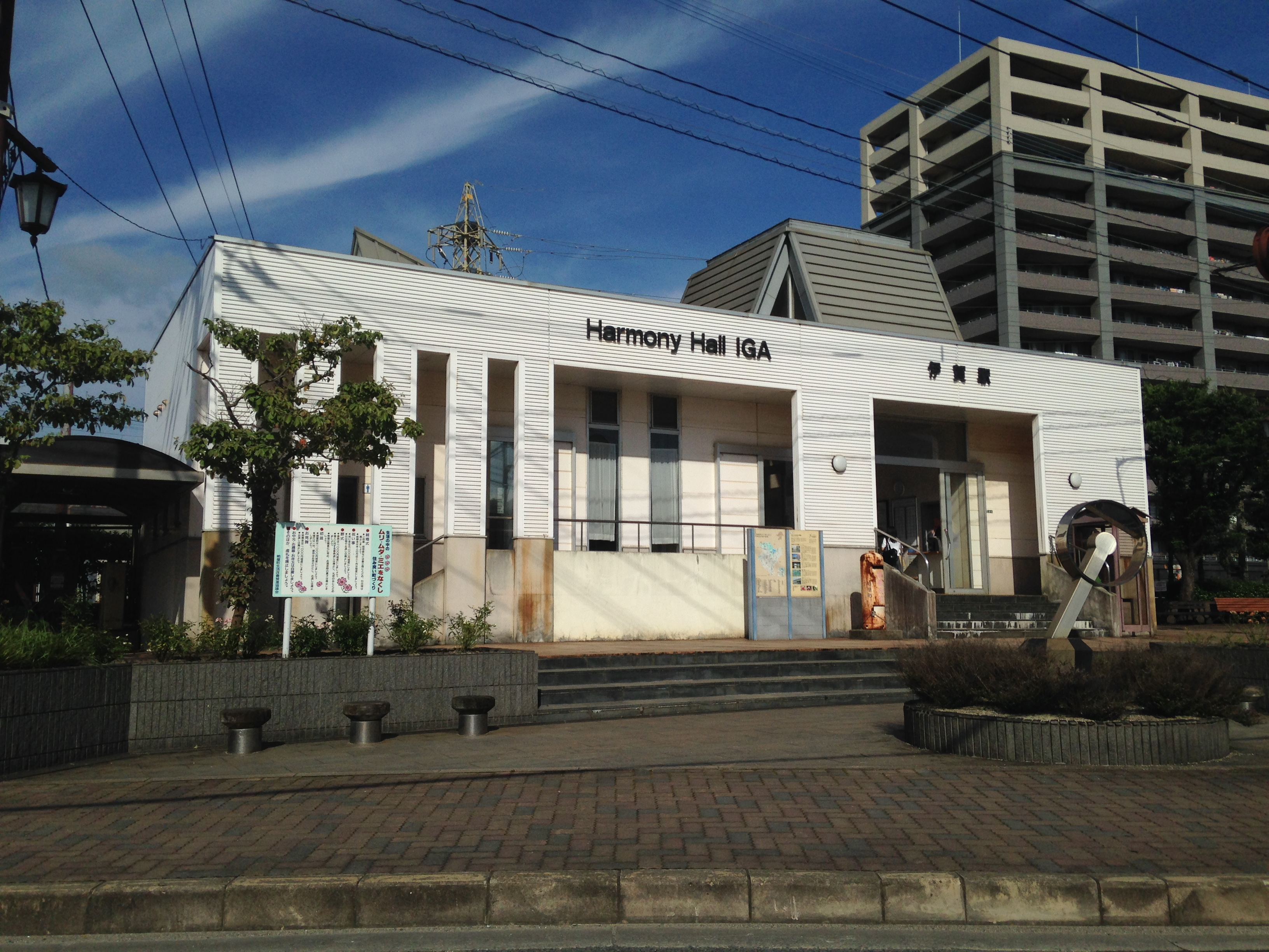 伊賀駅駅舎